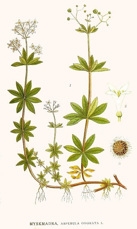 Galium odoratum (L.) Scop., syn. Asperula odorata L. Original Description Myskmadra, Asperula odorata L.